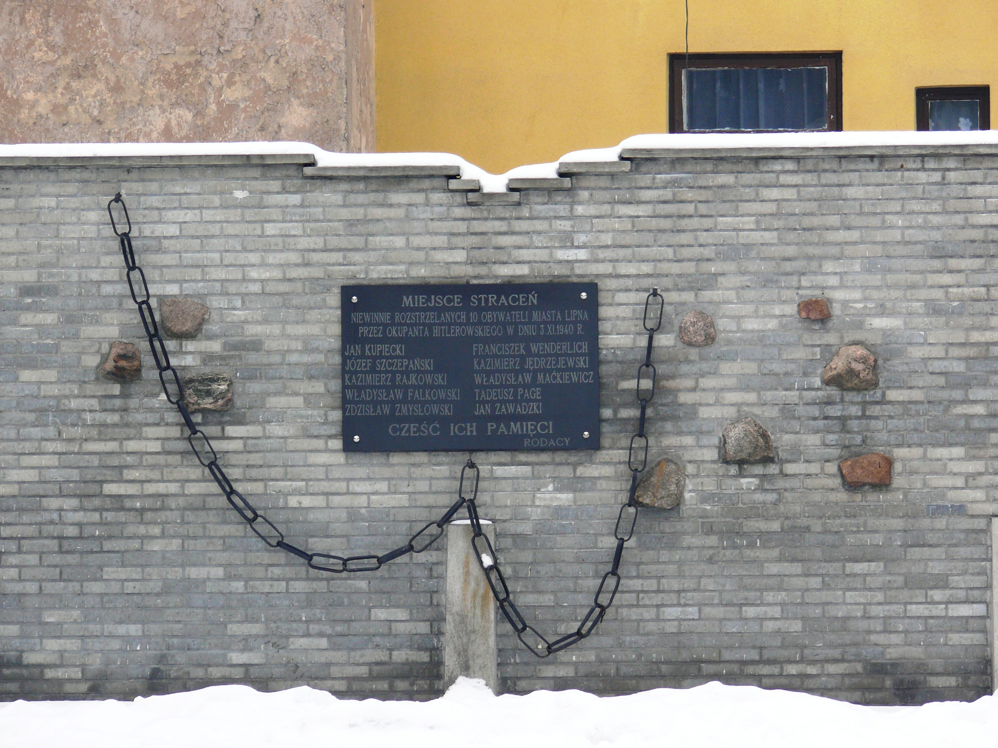 Miejsce straceń - z czasów II wojny światowej - na Placu Dekerta w Lipnie